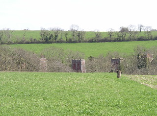 Photo Bruno Robert : "les piles du viaduc de Rapilly"